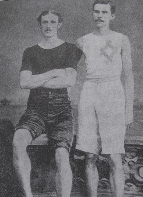 Laurence Myers (à droite), athlète américain né le 16 février 1858 et mort le 15 février 1899) , spécialiste de nombreuses disciplines (du 50 yd au mile). Au côté de Walter George